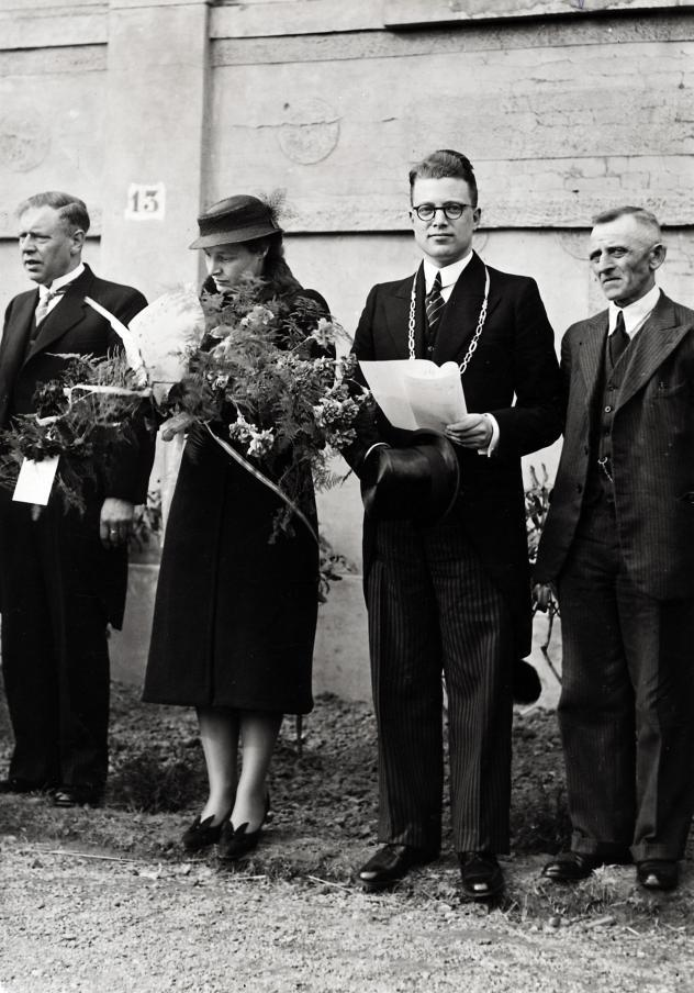 De heer D. Rijnders (met ketting en manuscript in de hand), burgemeester van Oude Tonge, geflankeerd door twee heren en een dame. Nederland, 1940.